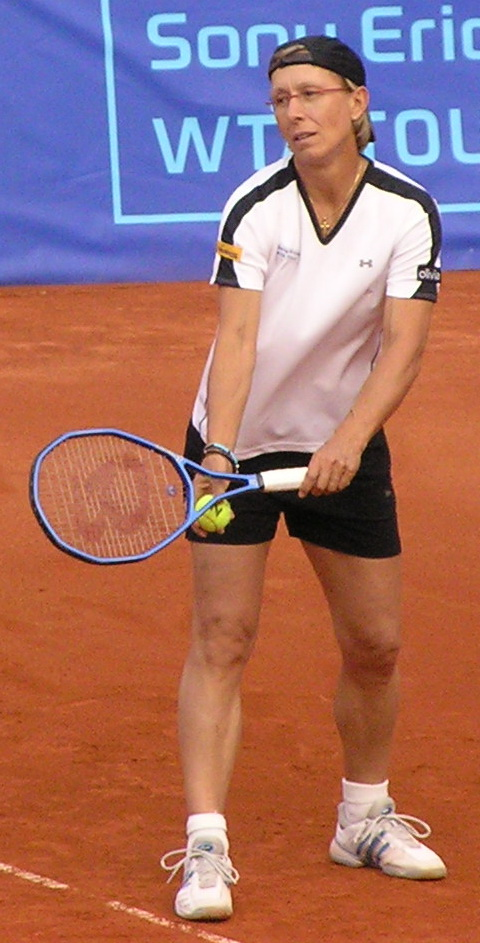 Martina Navrátilová ! Photo taken from ECM Prague Open 2006 (